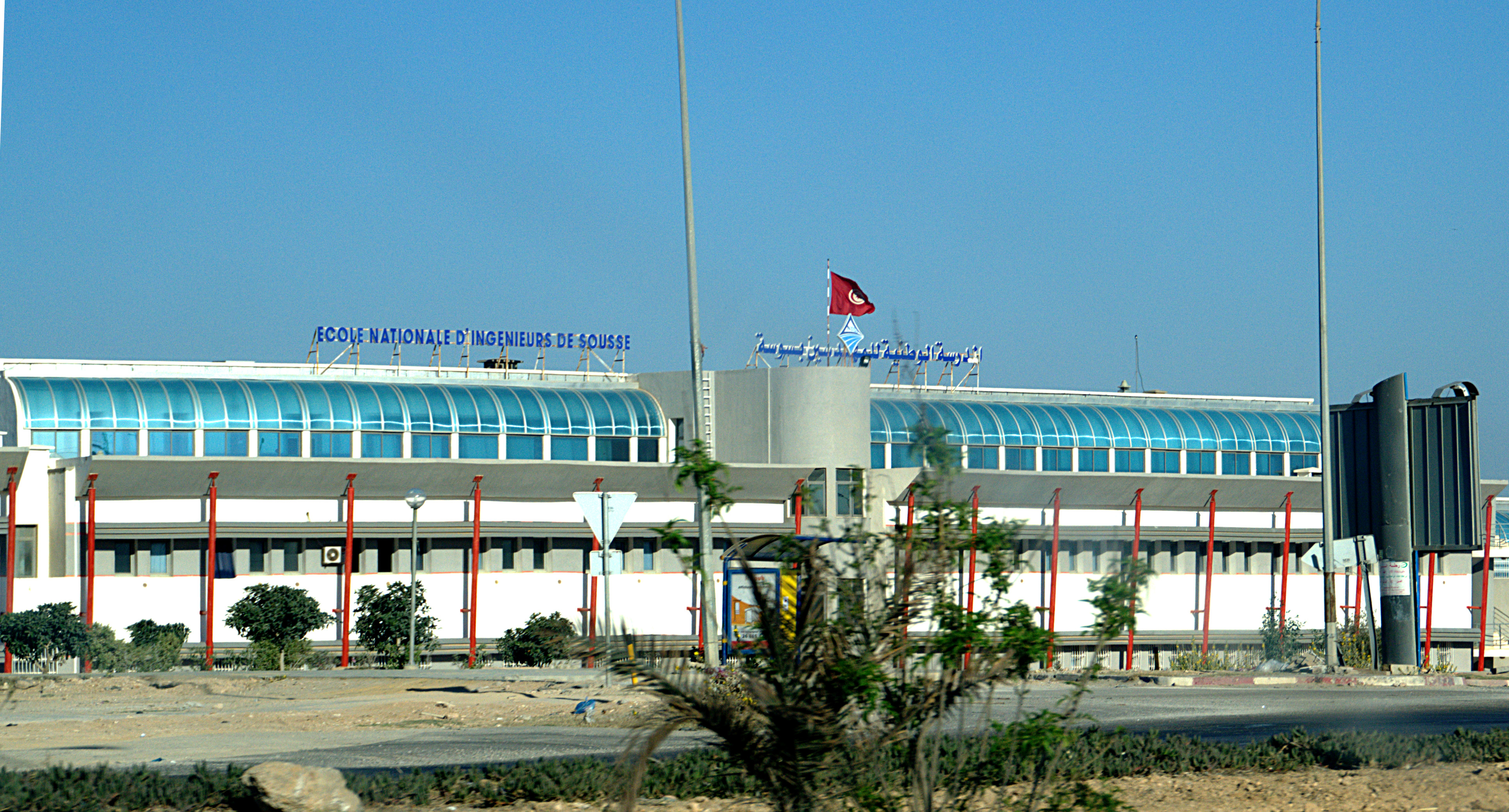 École nationale d'ingénieurs de Sousse